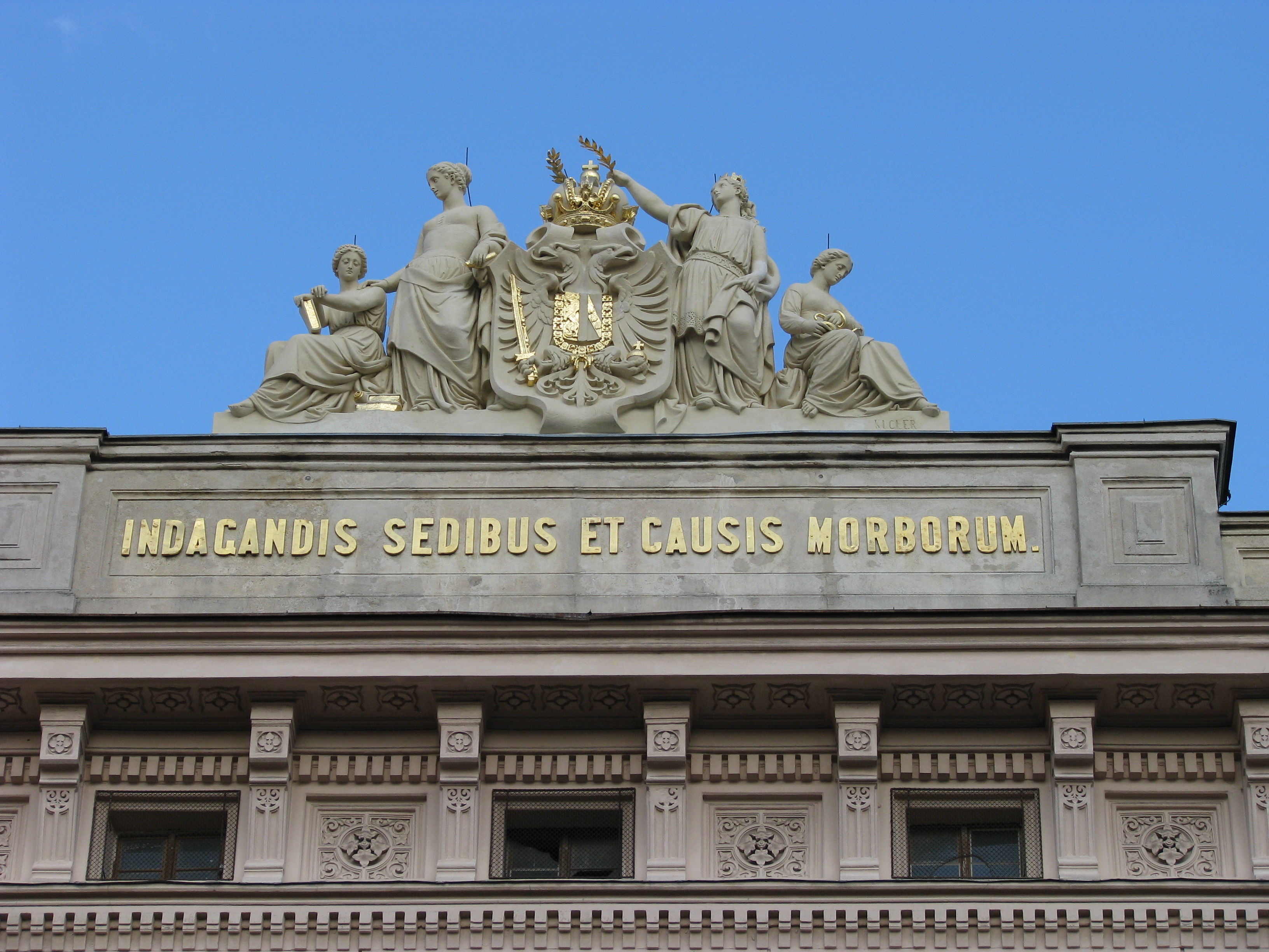 Pathologisch-Anatomisches Institut